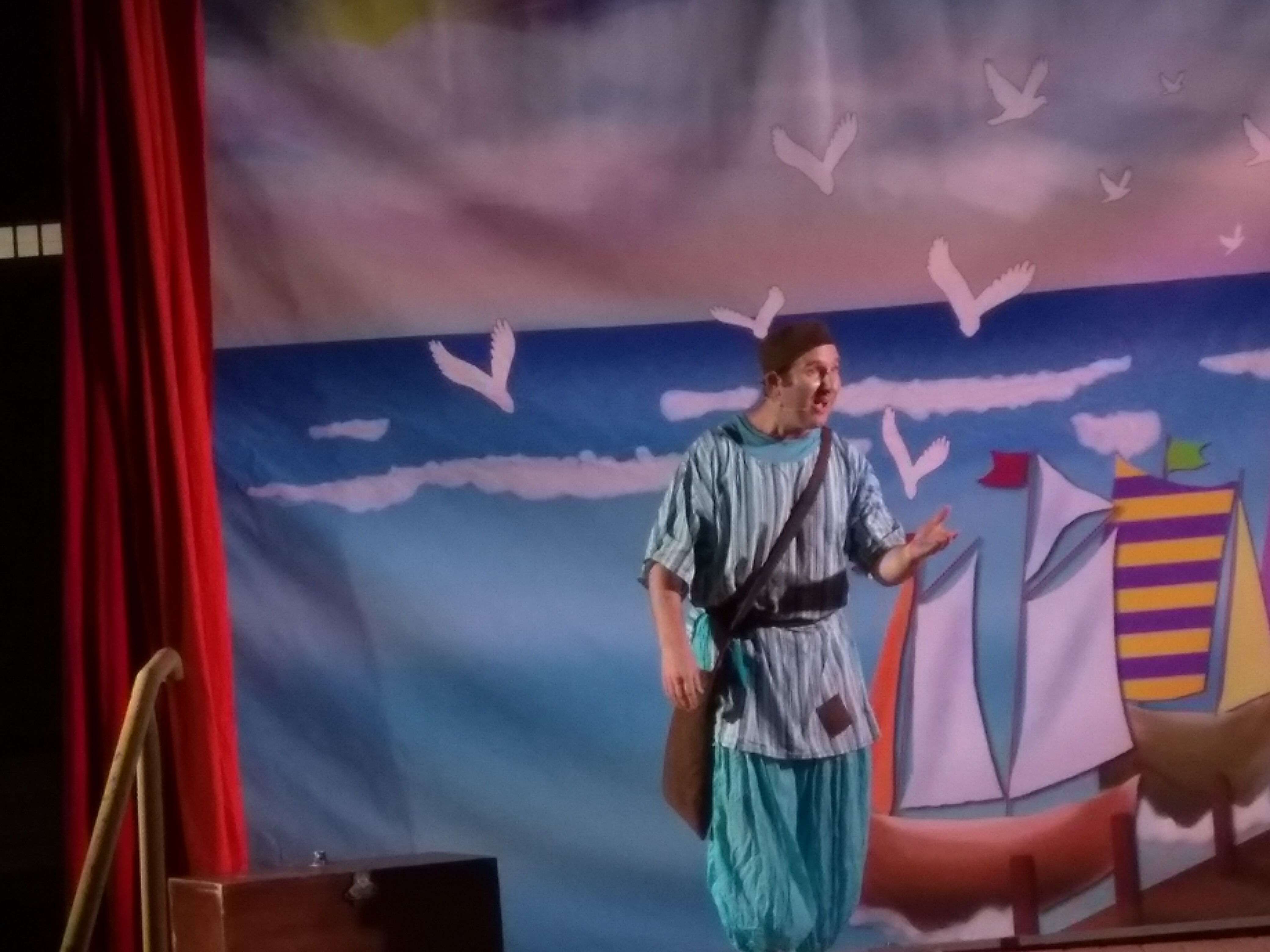 השחקן אייל ניידורף מופיע בלוד בליל הושענא רבה.